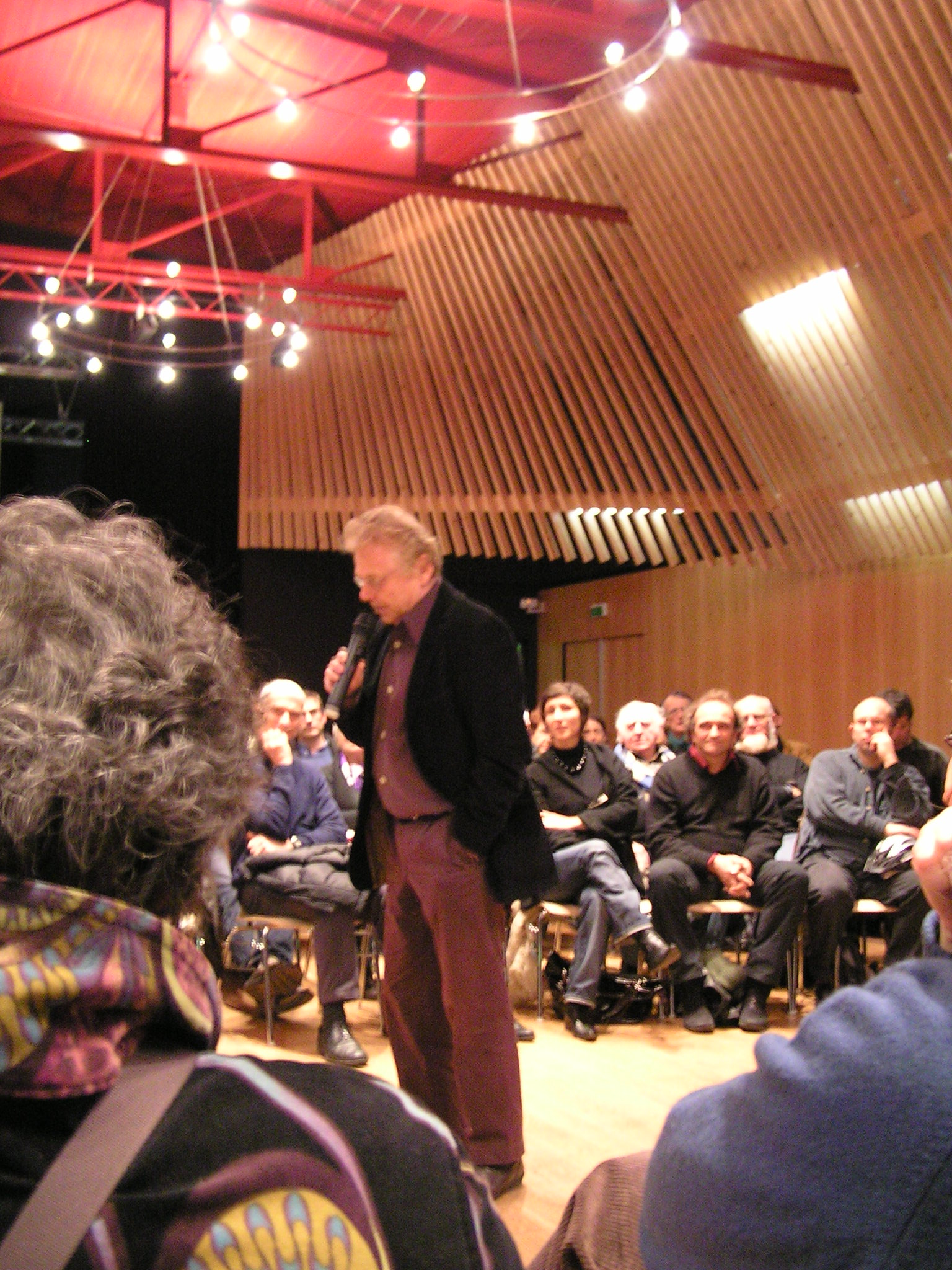 réunion d'Europe écologie le 25.11.2008 à Nantes